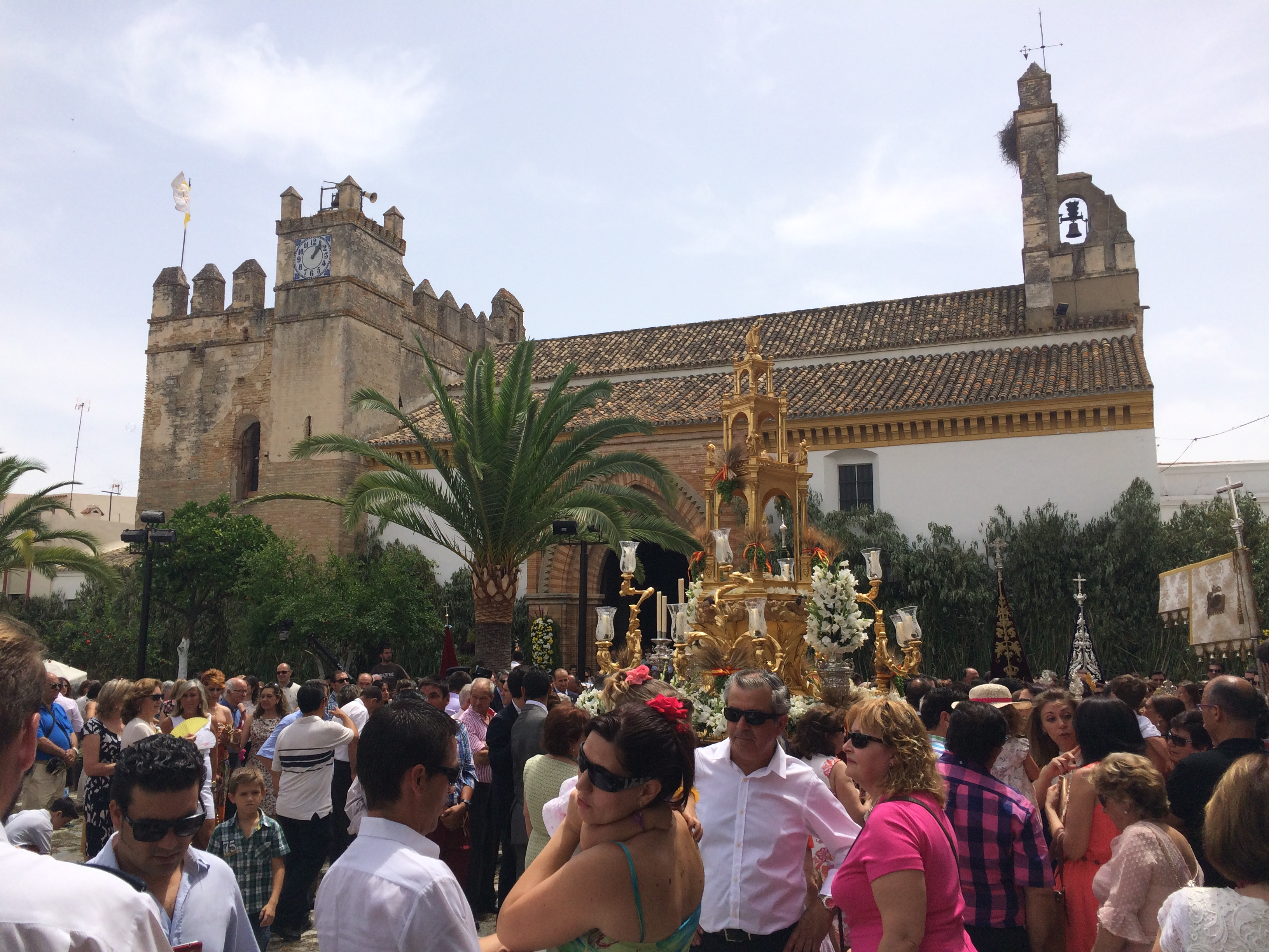 Custodia procesionando por la plaza de España de Hinojos